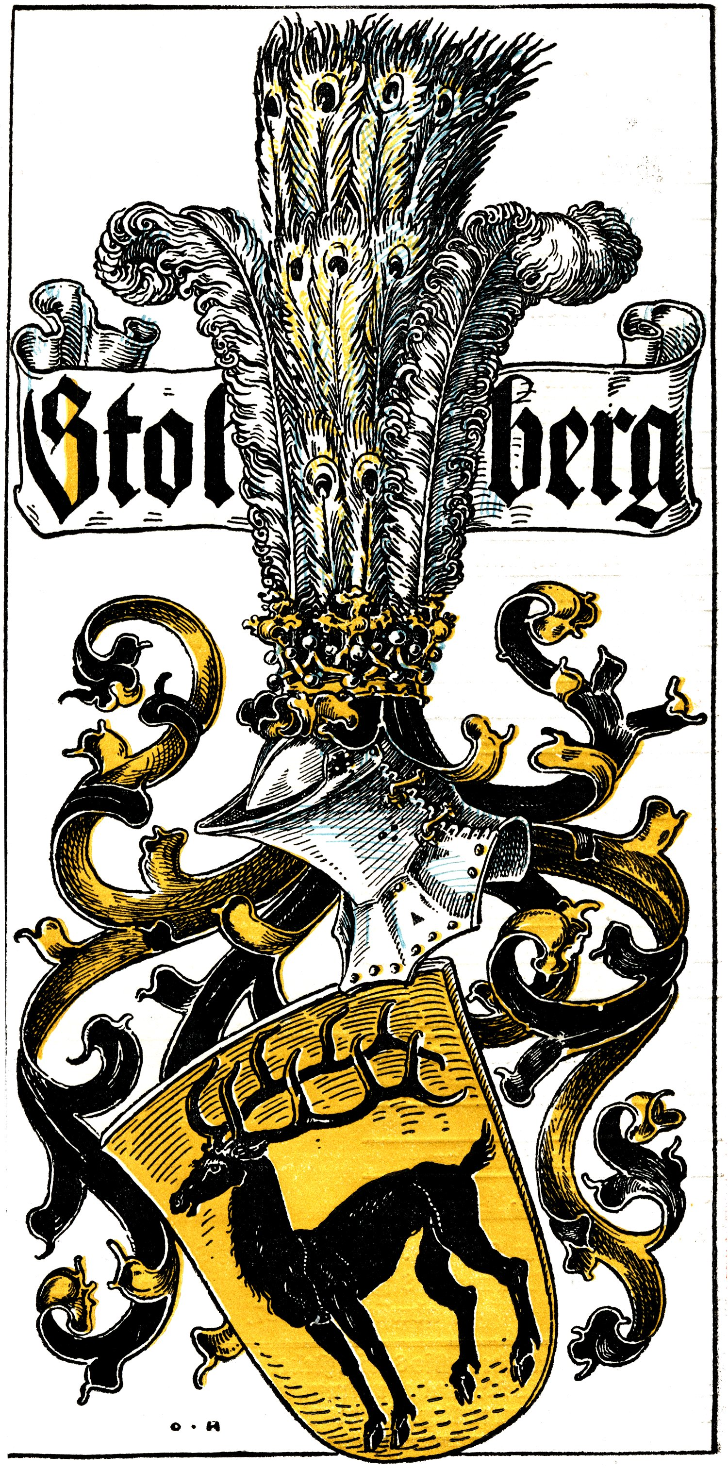 Stammwappen der Grafen zu Stolberg